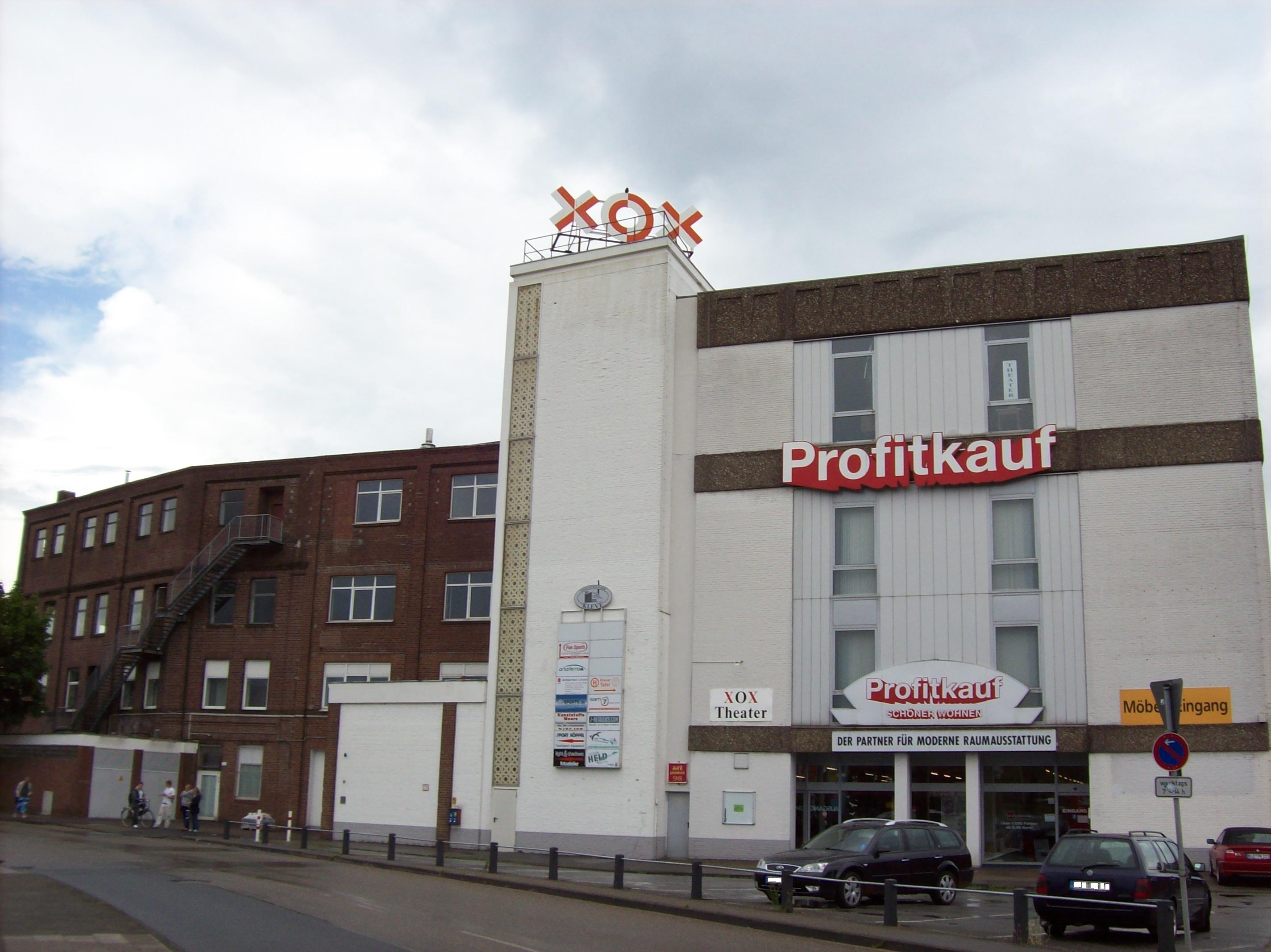 Das XOX-Theater Kleve im 3. Stockwerk des alten Fabrikgebäudes der XOX